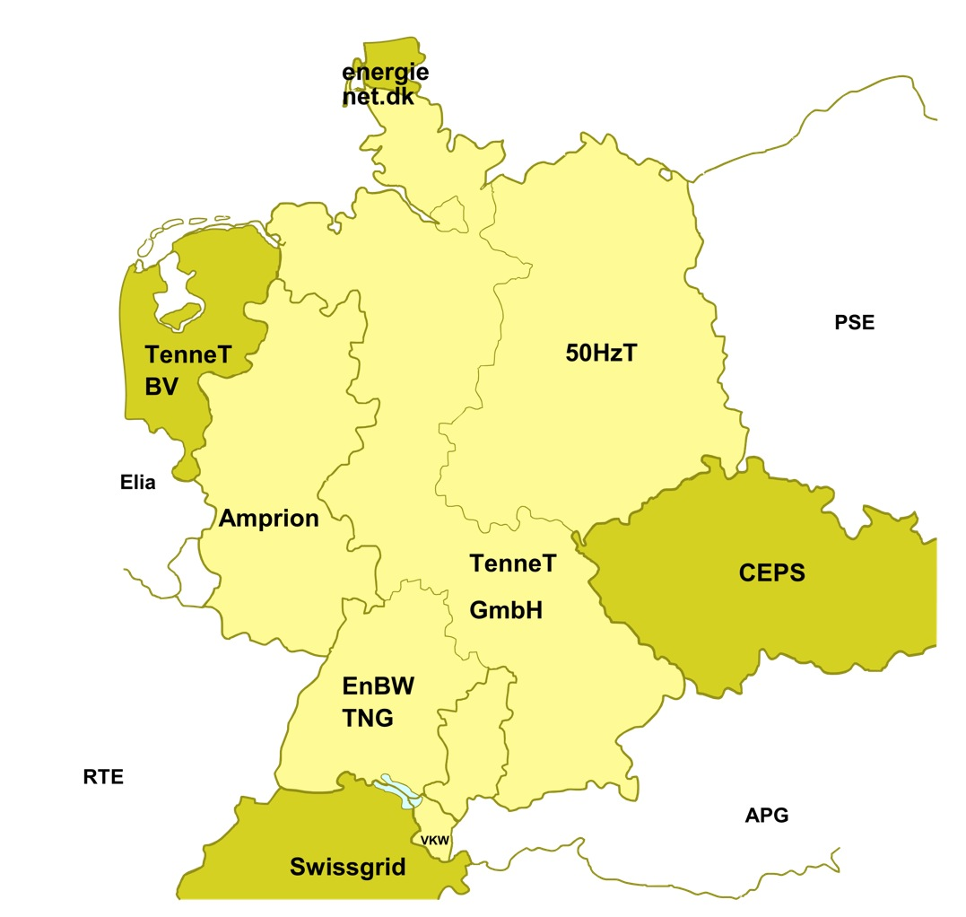 Geplante internationale Erweiterung des Netzregelverbundes (NRV)